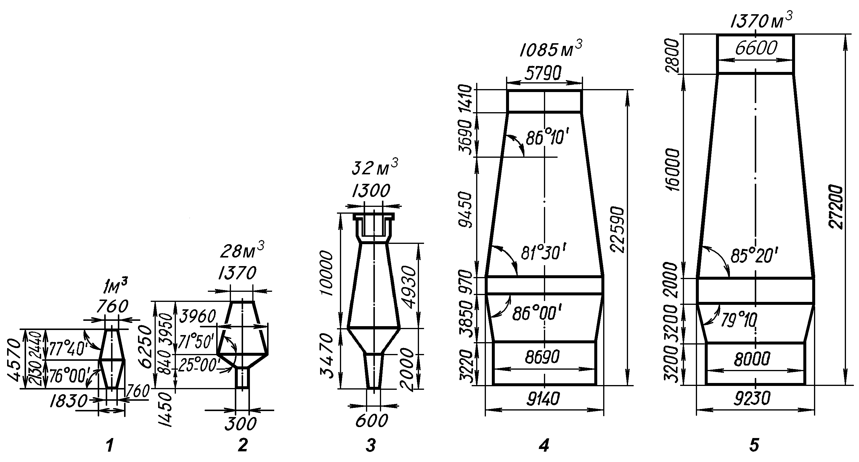 Історія розвитку профілю доменної печі.